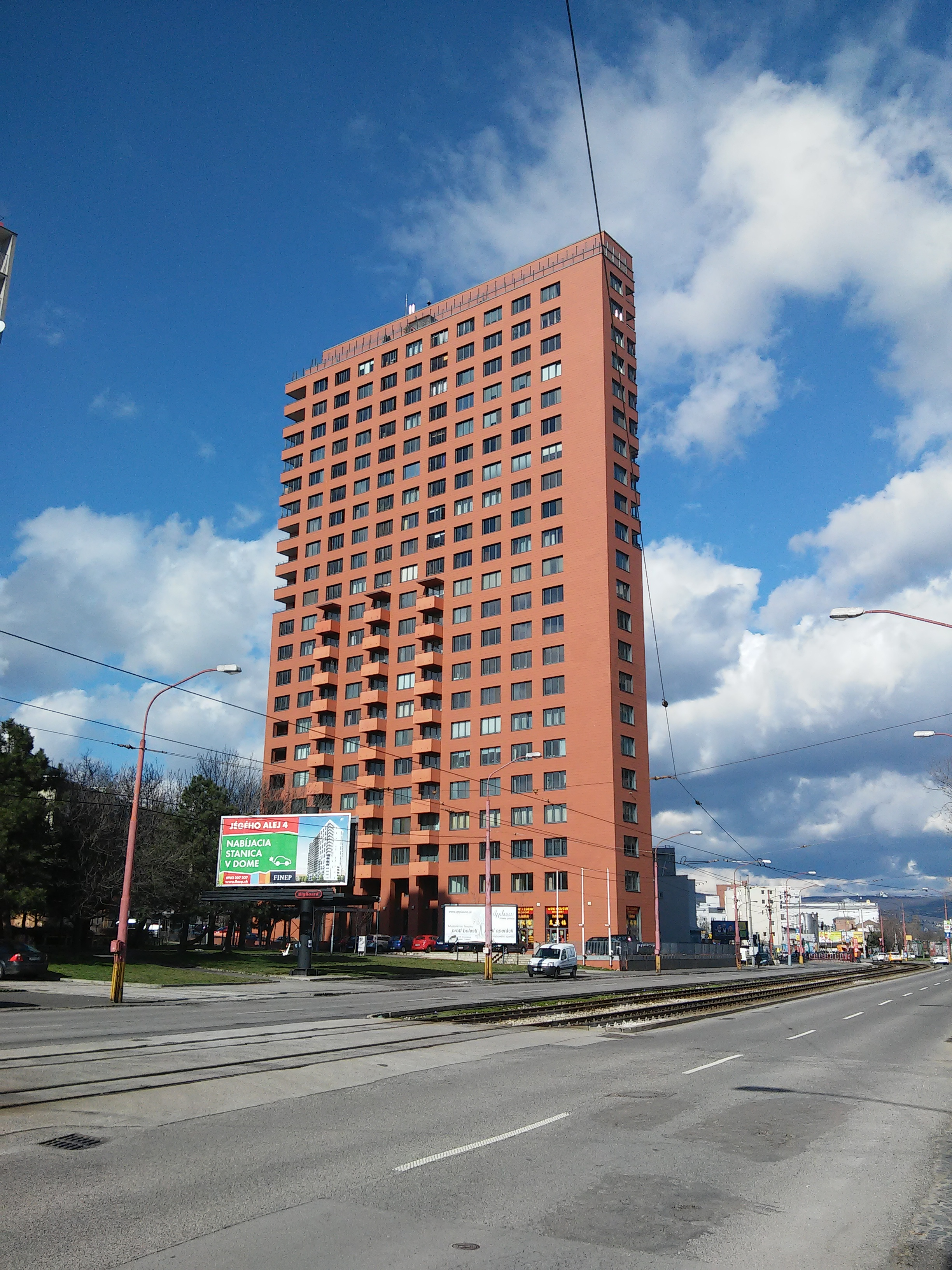 obytný dom Manhattan, Bratislava